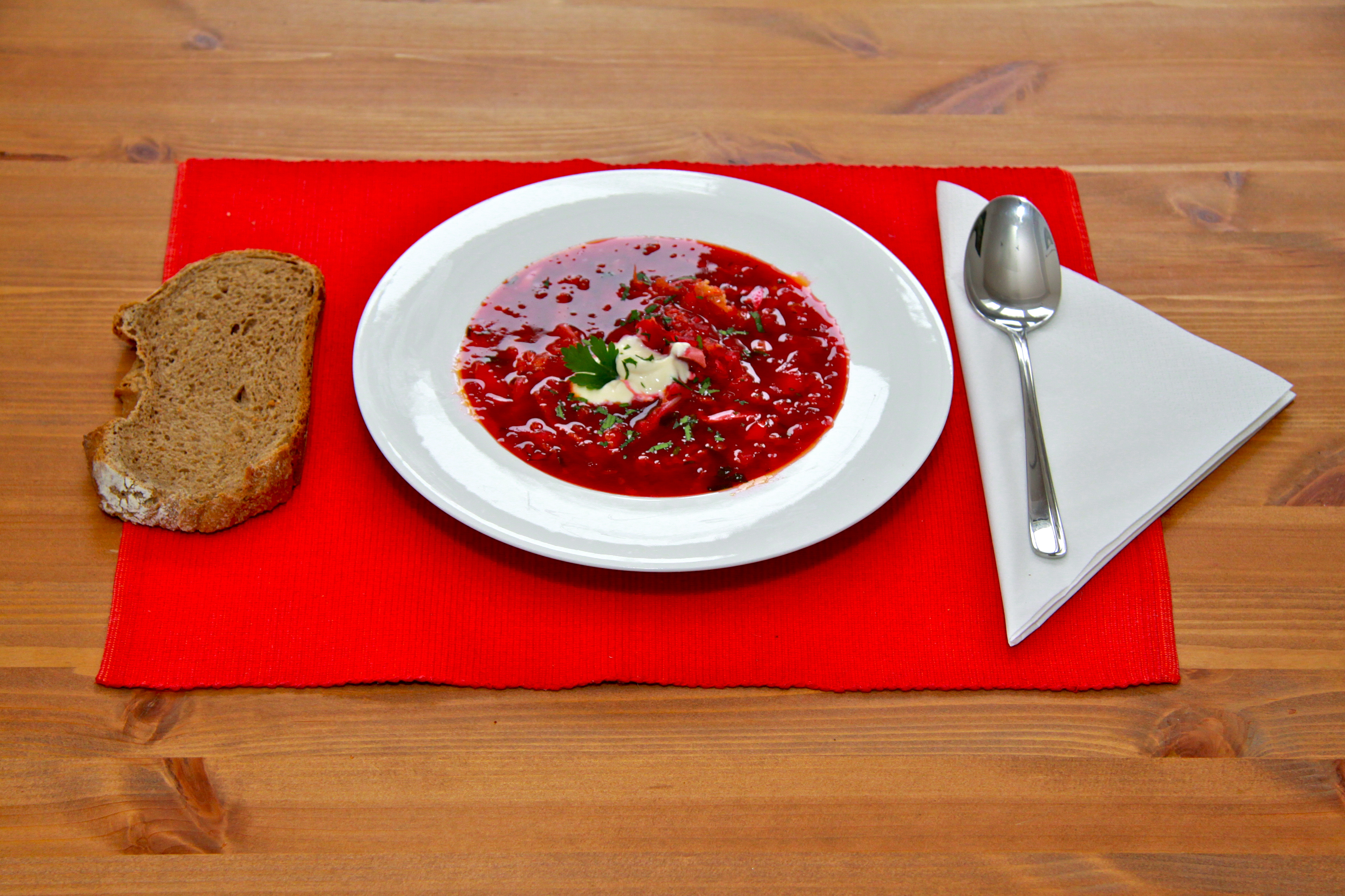 Rotkohl-Borschtsch mit Feigen.